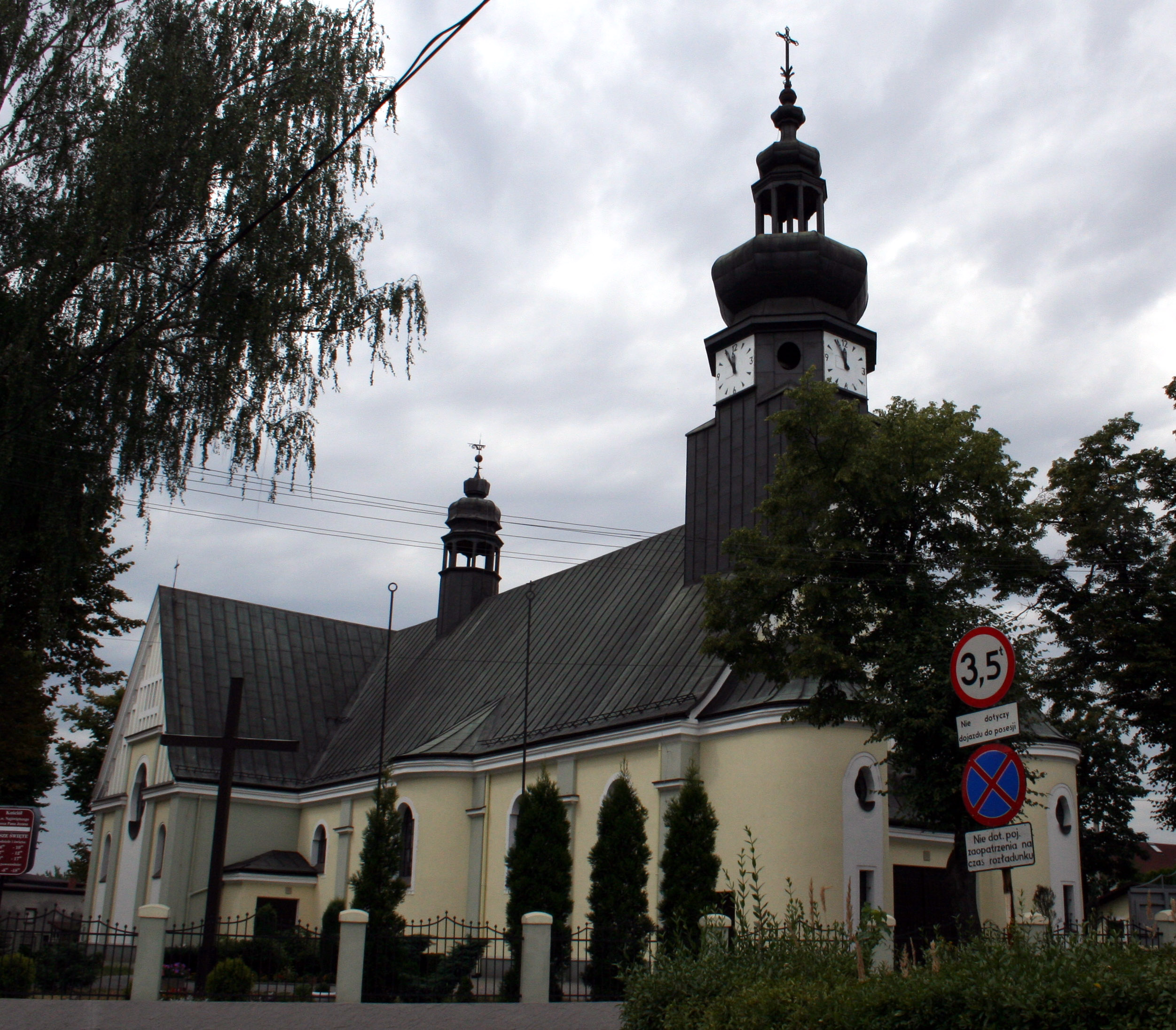 Kościół Najświętszego Serca Pana Jezusa w Rybniku Niedobczycach